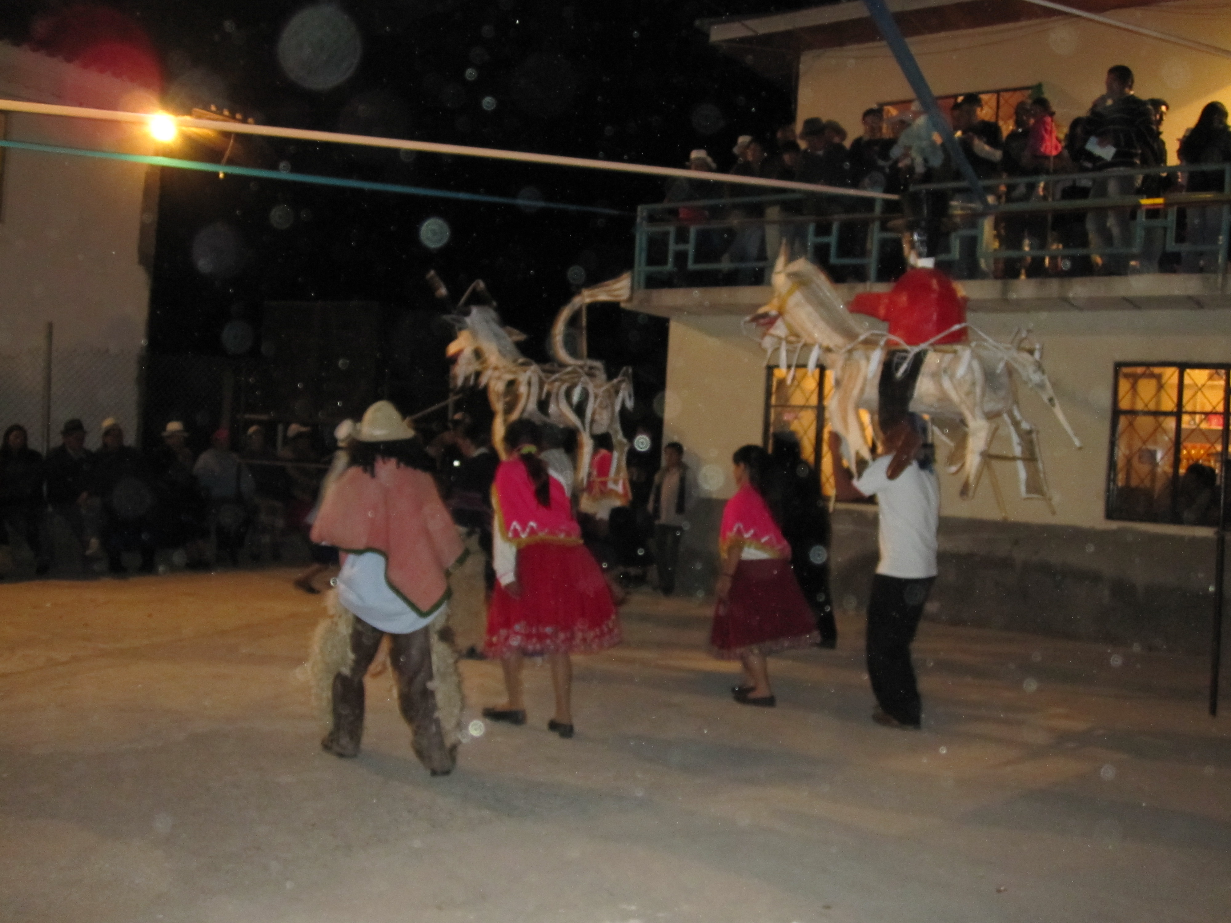 Vaca loca at a fiesta in Taniloma, Ecuador.